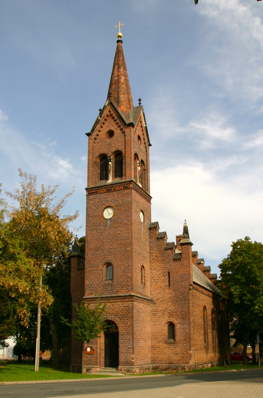 Elsnigk ist einOrtsteil der Gemeinde Osternienburger Land im Landkreis Anhalt-Bitterfeld in Sachsen-Anhalt.